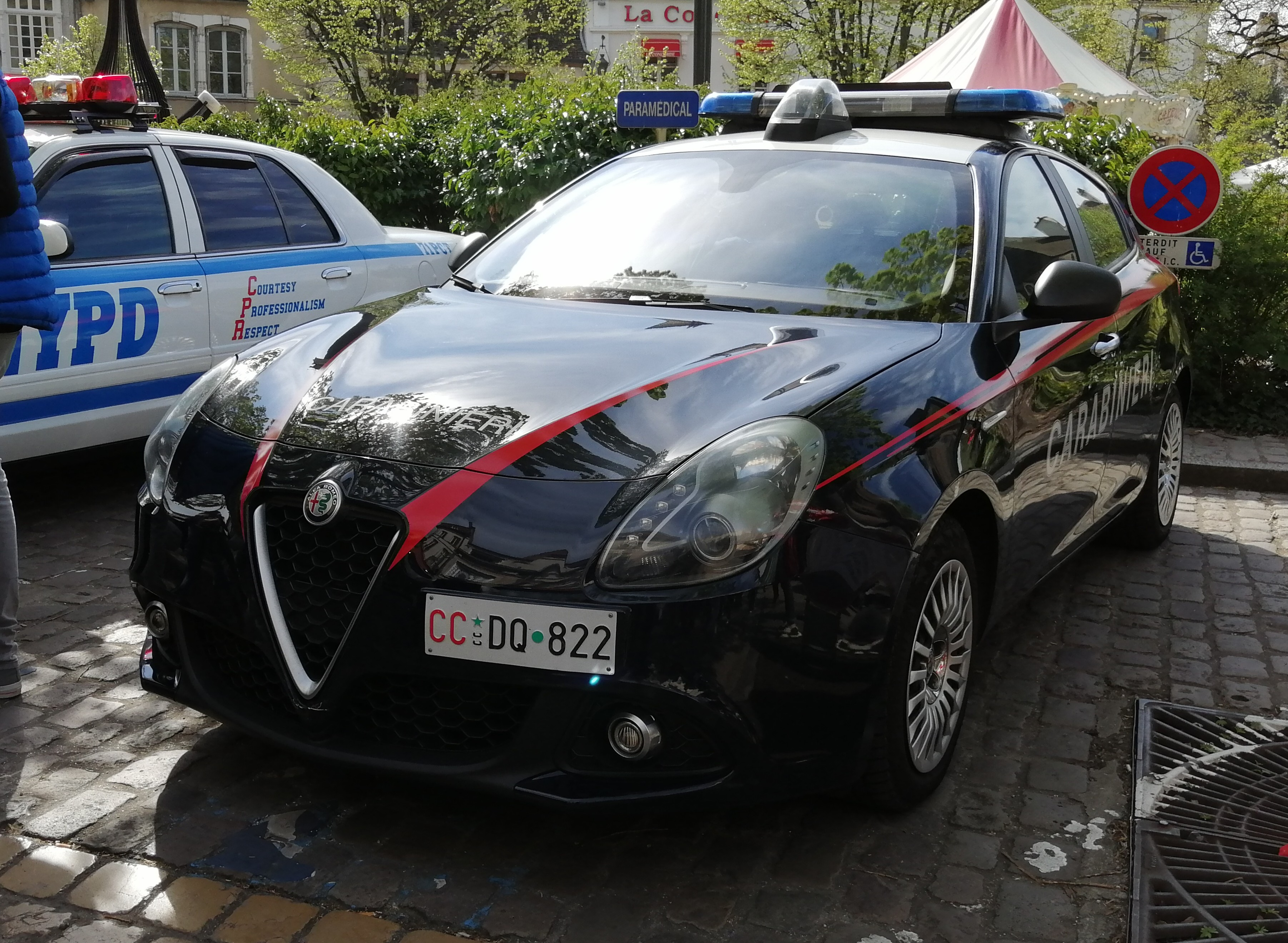 dav